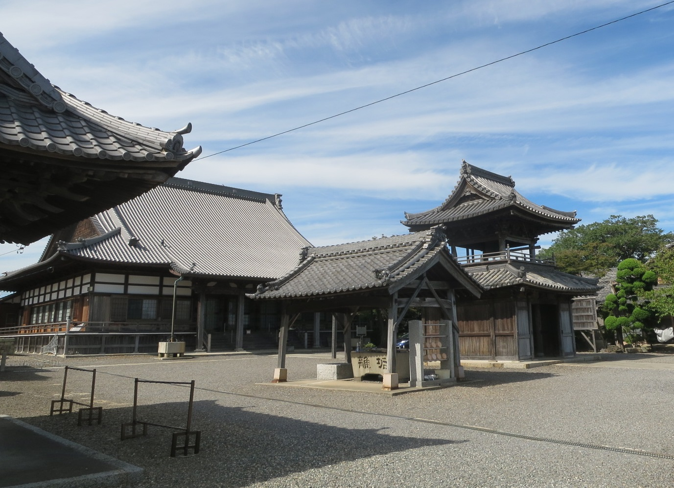 西尾市 養寿寺